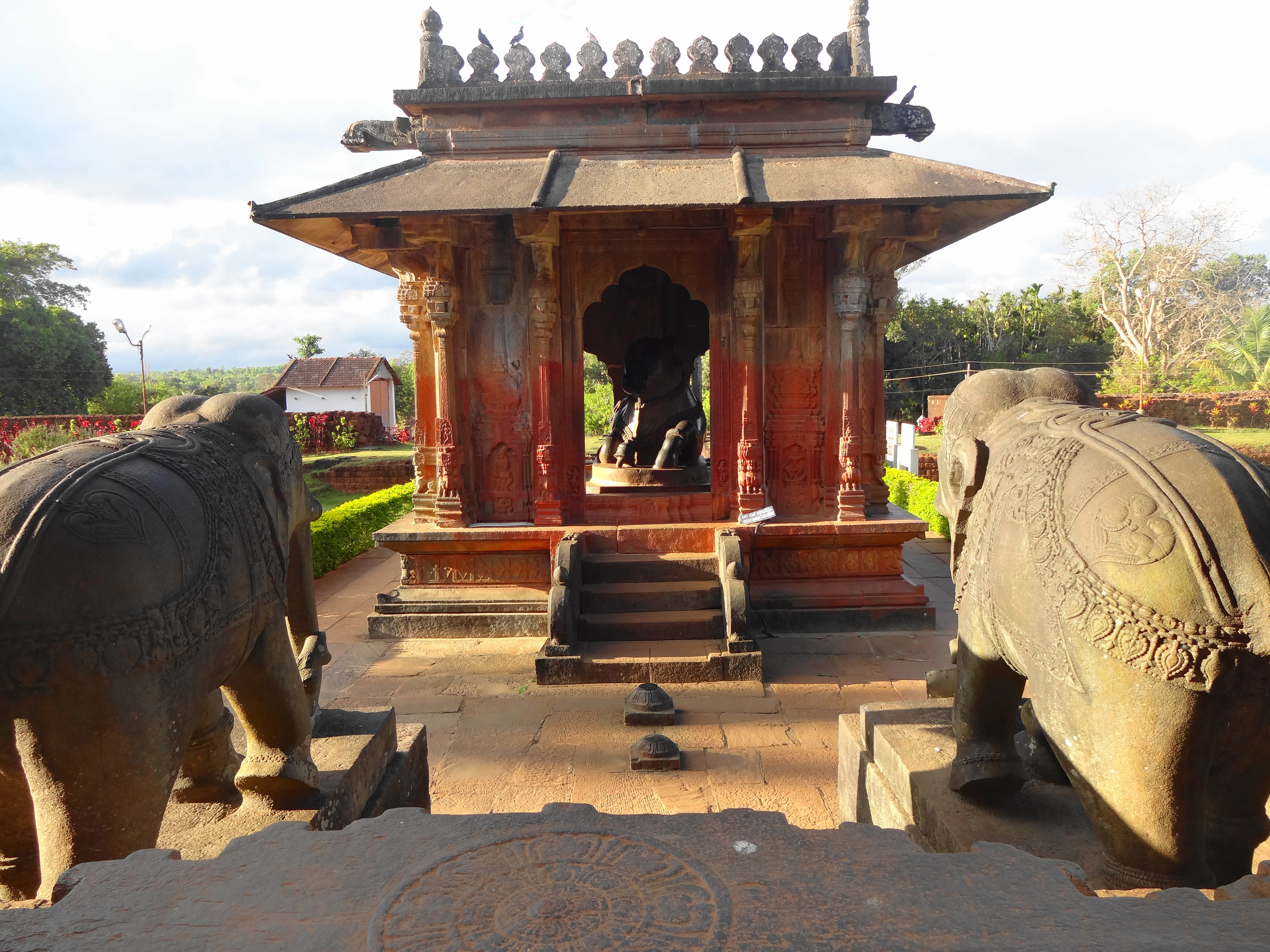 Nandi mantapa in front of Aghoreshwara Temple,Ikkeri,Karnataka